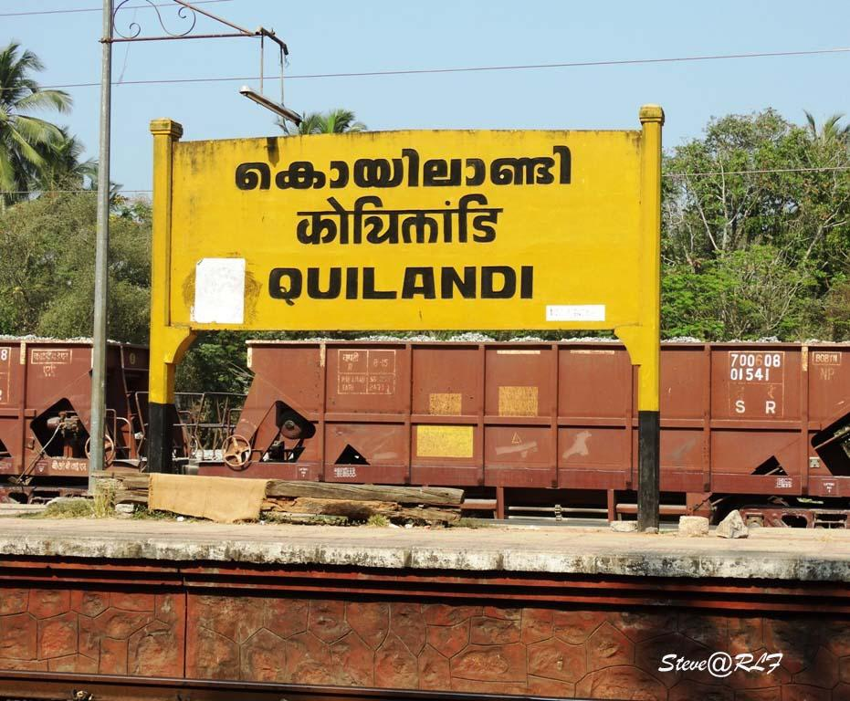 Koyilandy Railway Station